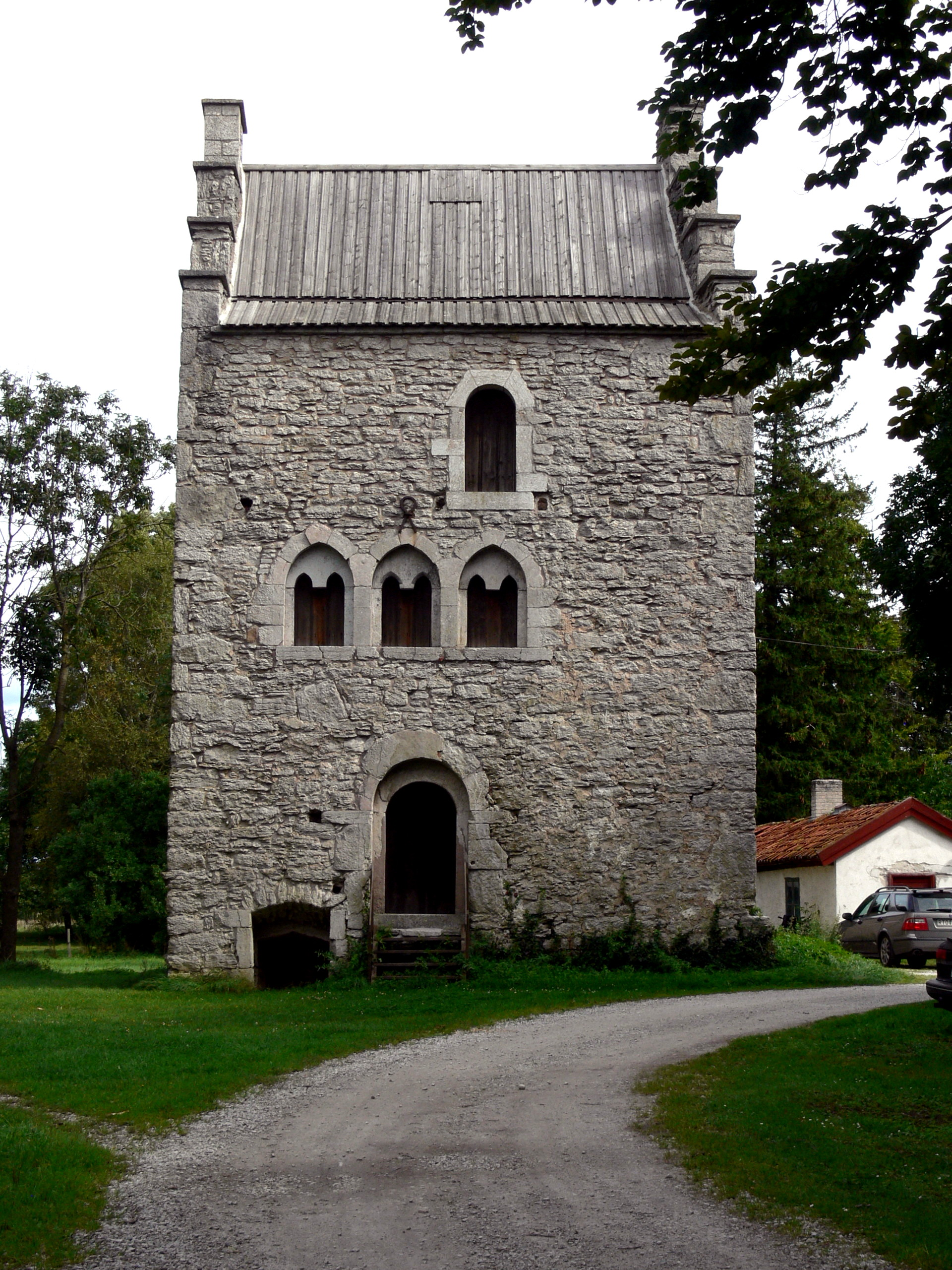 Stora Hästnäs auf Gotland. Mittelalterliches Gutshaus ( 14.Jhdt.)